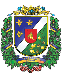 Герб Олевського району